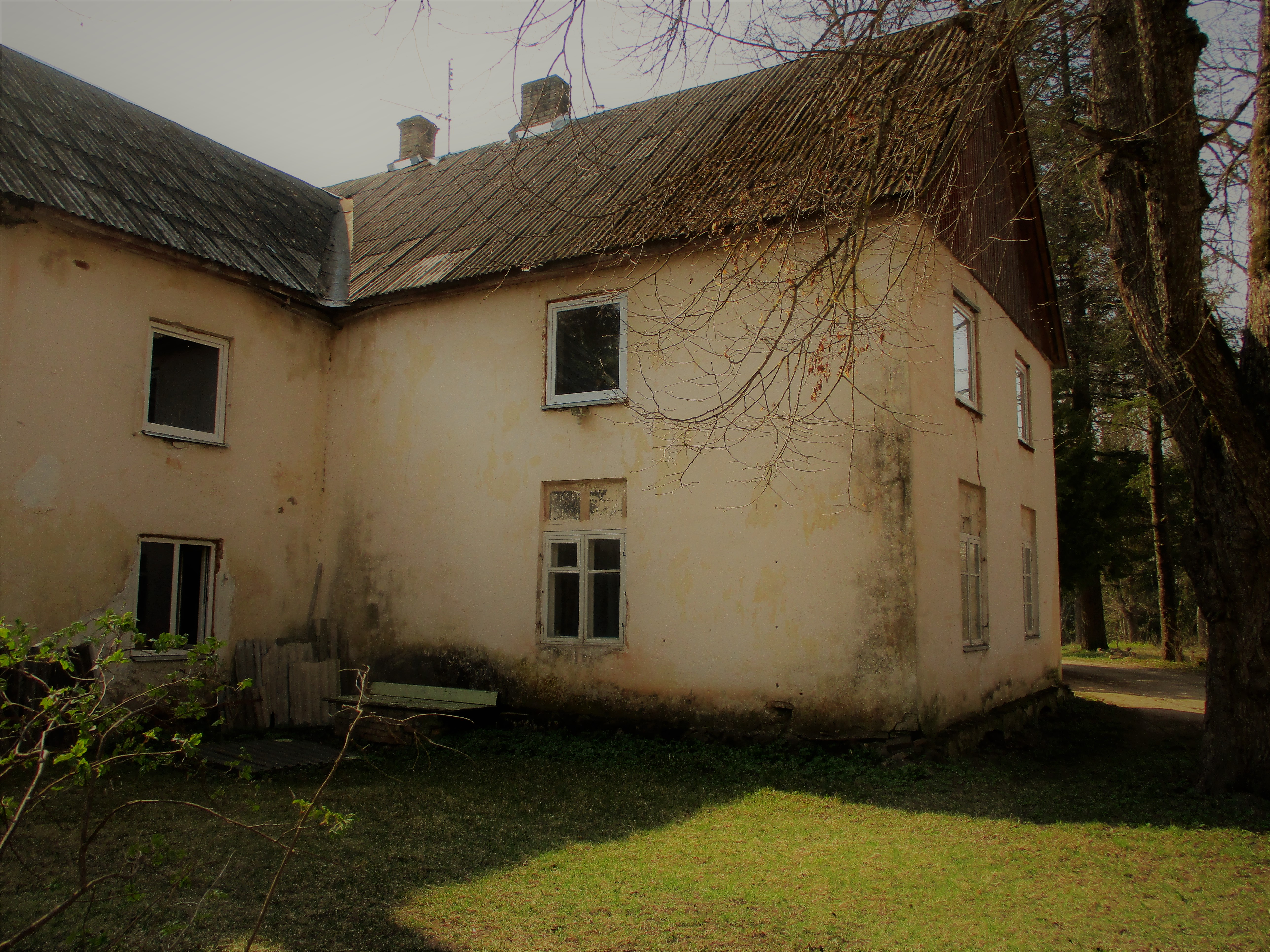 Vaade idasuunast kunagise mõisa puidust peahoone kivist loodeotsale.